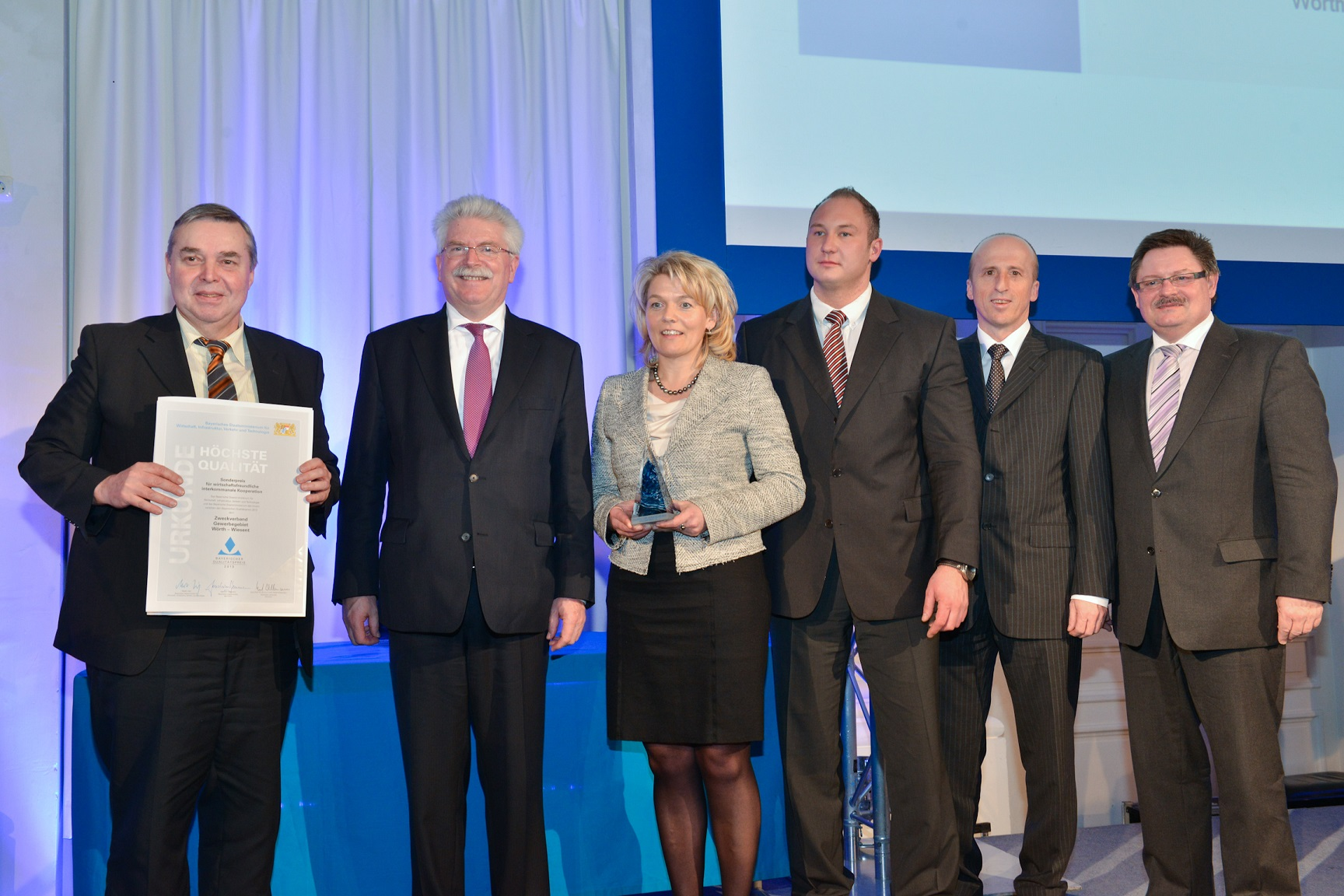 Urkunde Wörth Donau